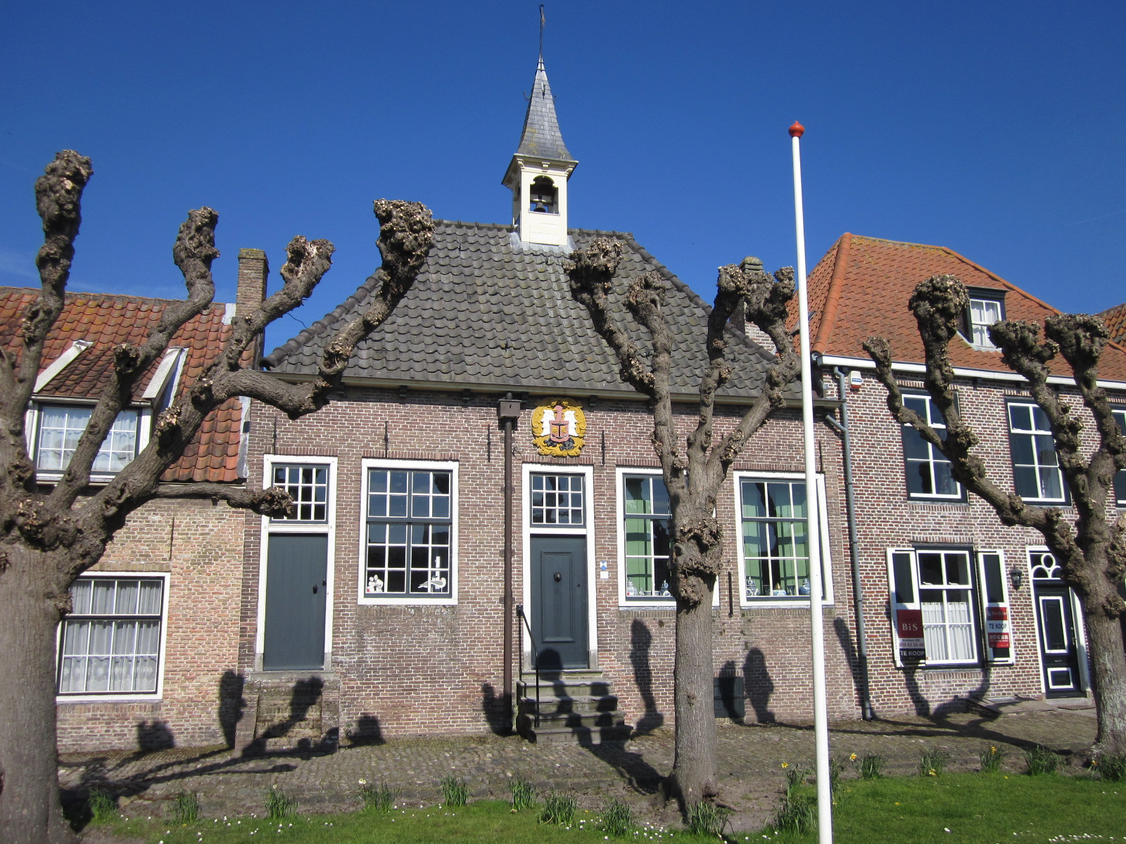 Raadhuis, Marktplein 12 in Sint Anna ter Muiden